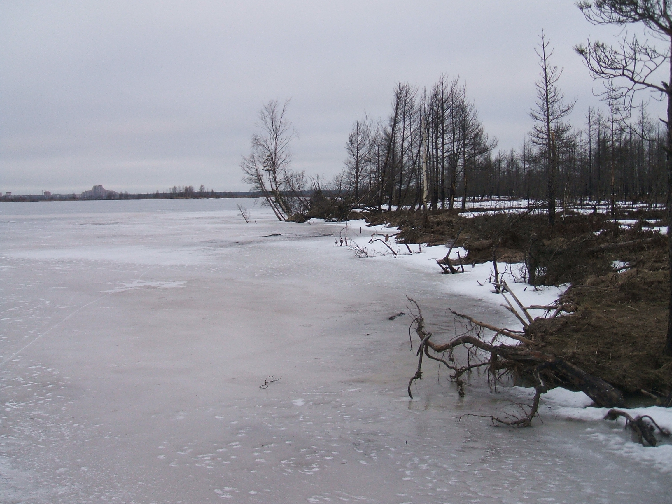 размыв берега Сестрорецкого Разлива волновым процессом